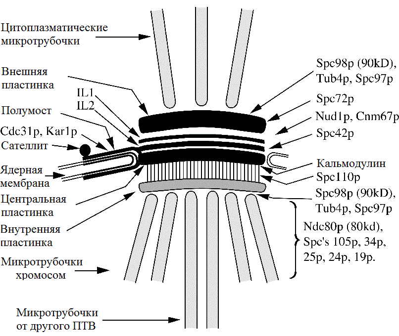 Структура полярного тельца веретена S. cerevisiae с указанием основных частей и составляющих их белков.